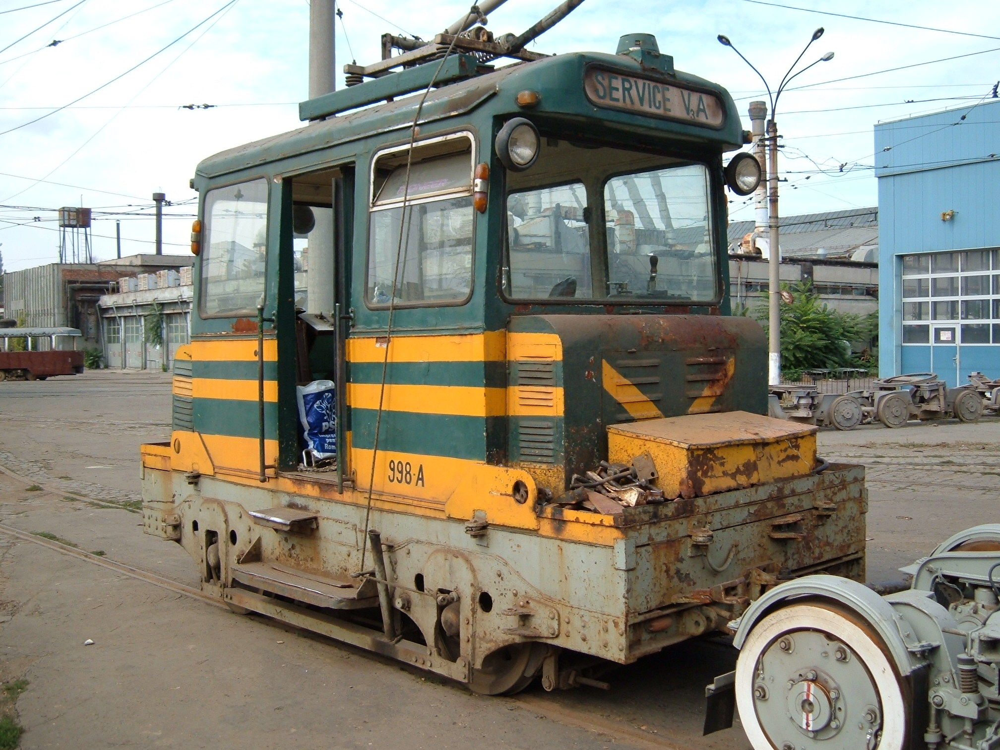 Vagon utilitar (Măgăruș) RATB nr. 998A